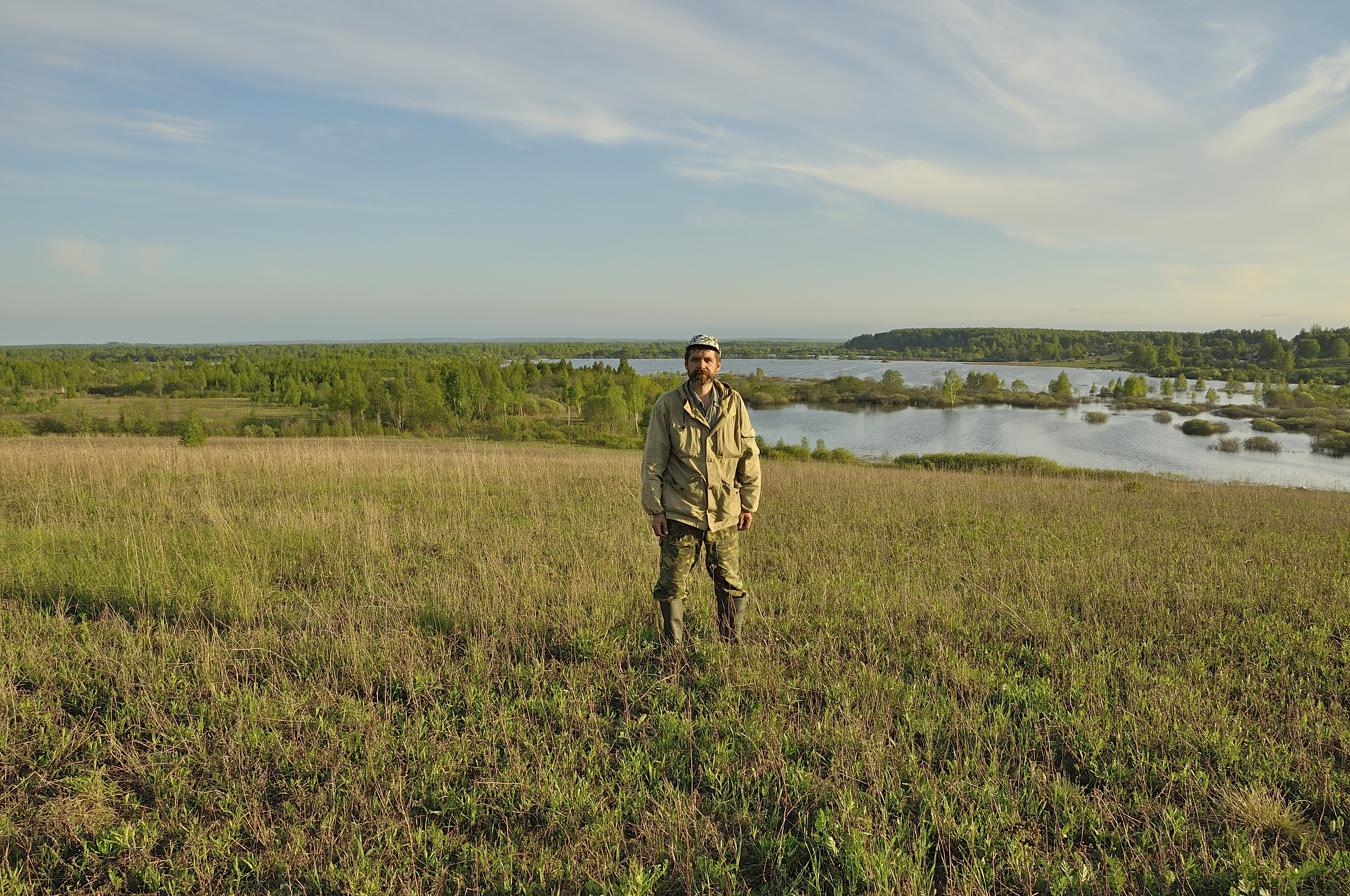 На Днепре